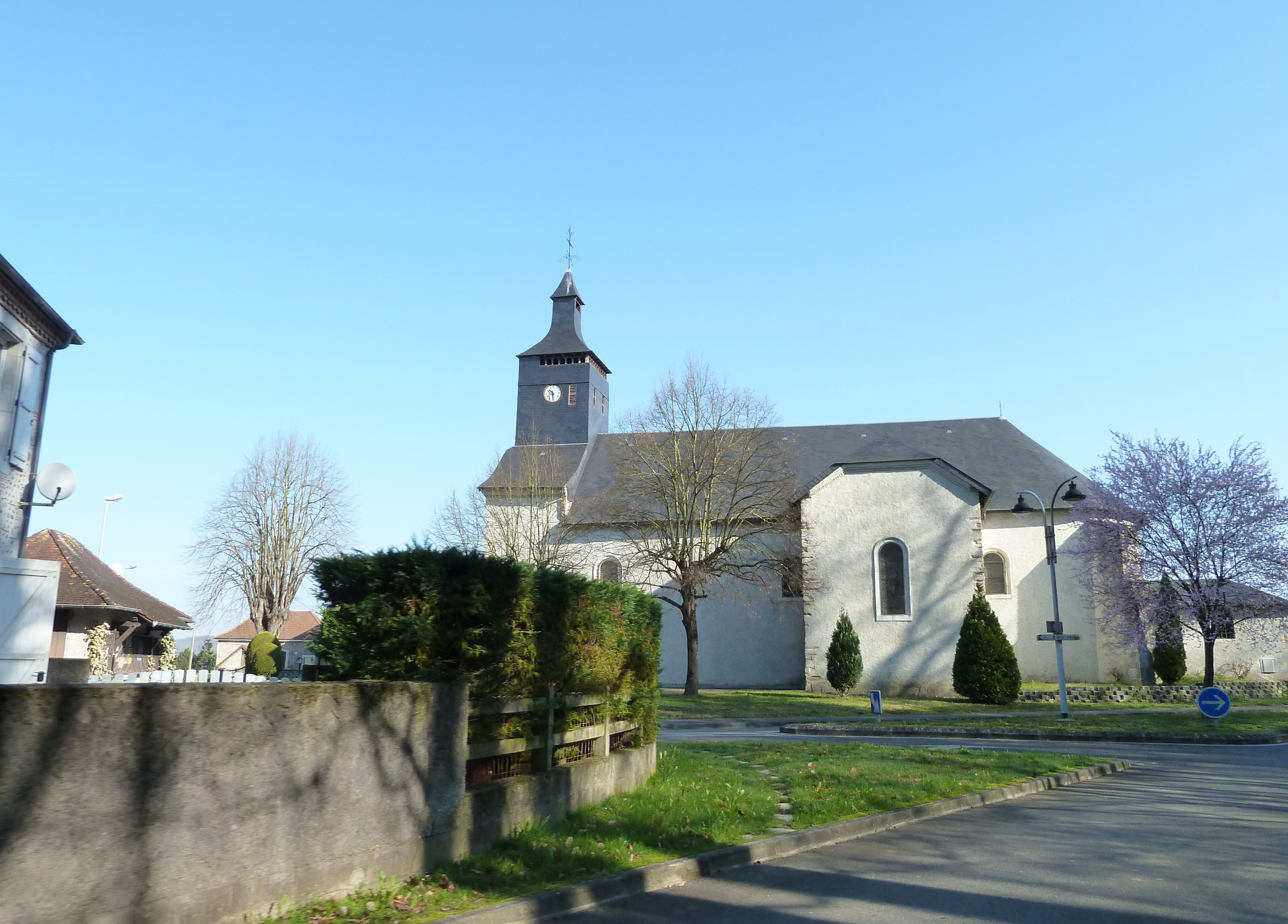 Église de Mont (Pyrénées-Atlantiques)